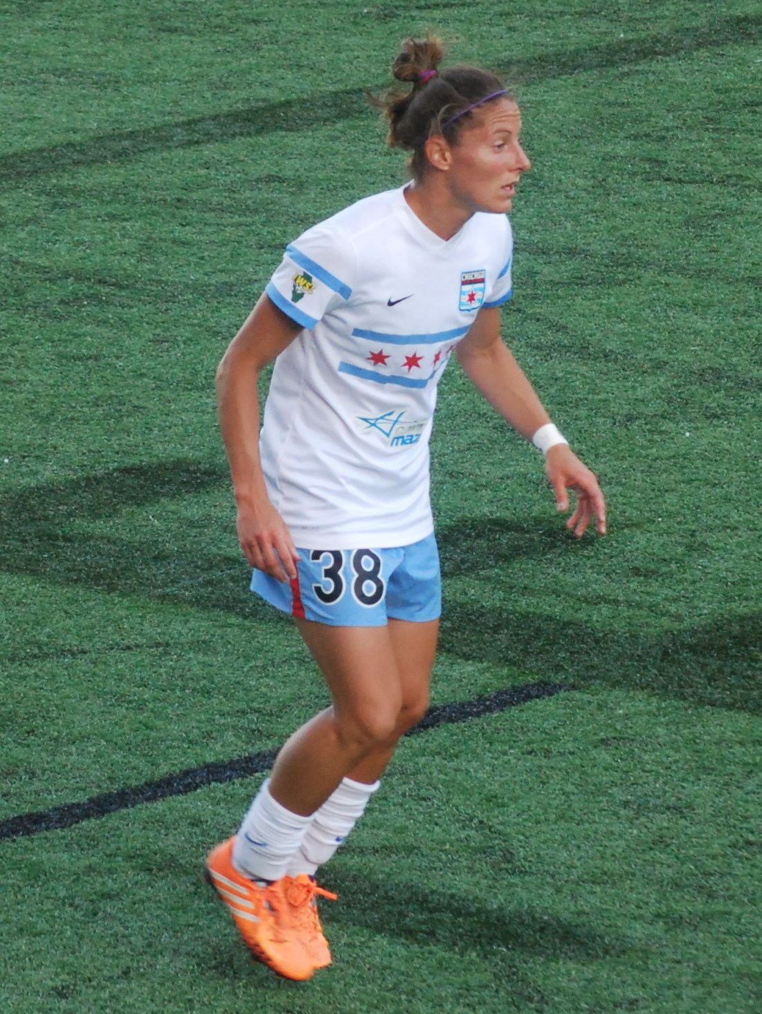 Julianne Sitch (2014)